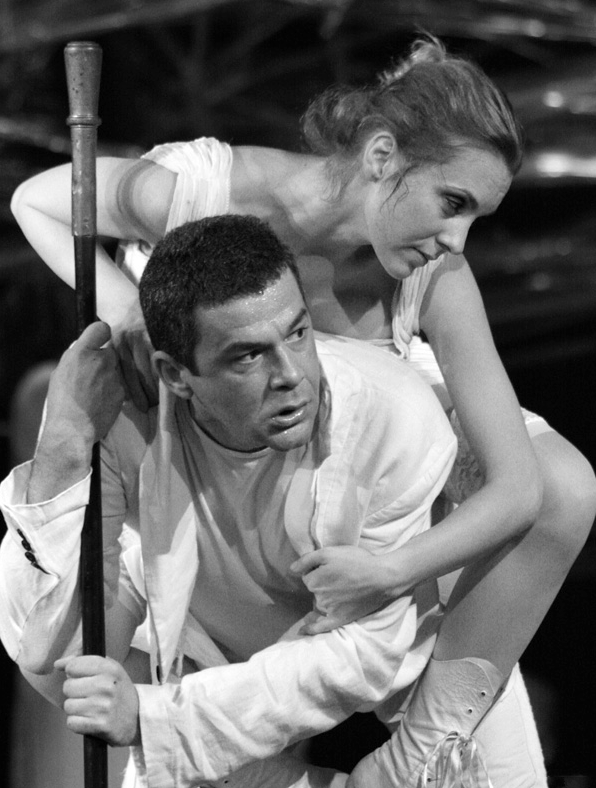 Nebojša Glogovac u predstavi Metamorfoze